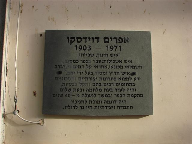 בית דווידסקו - לוח זכרון